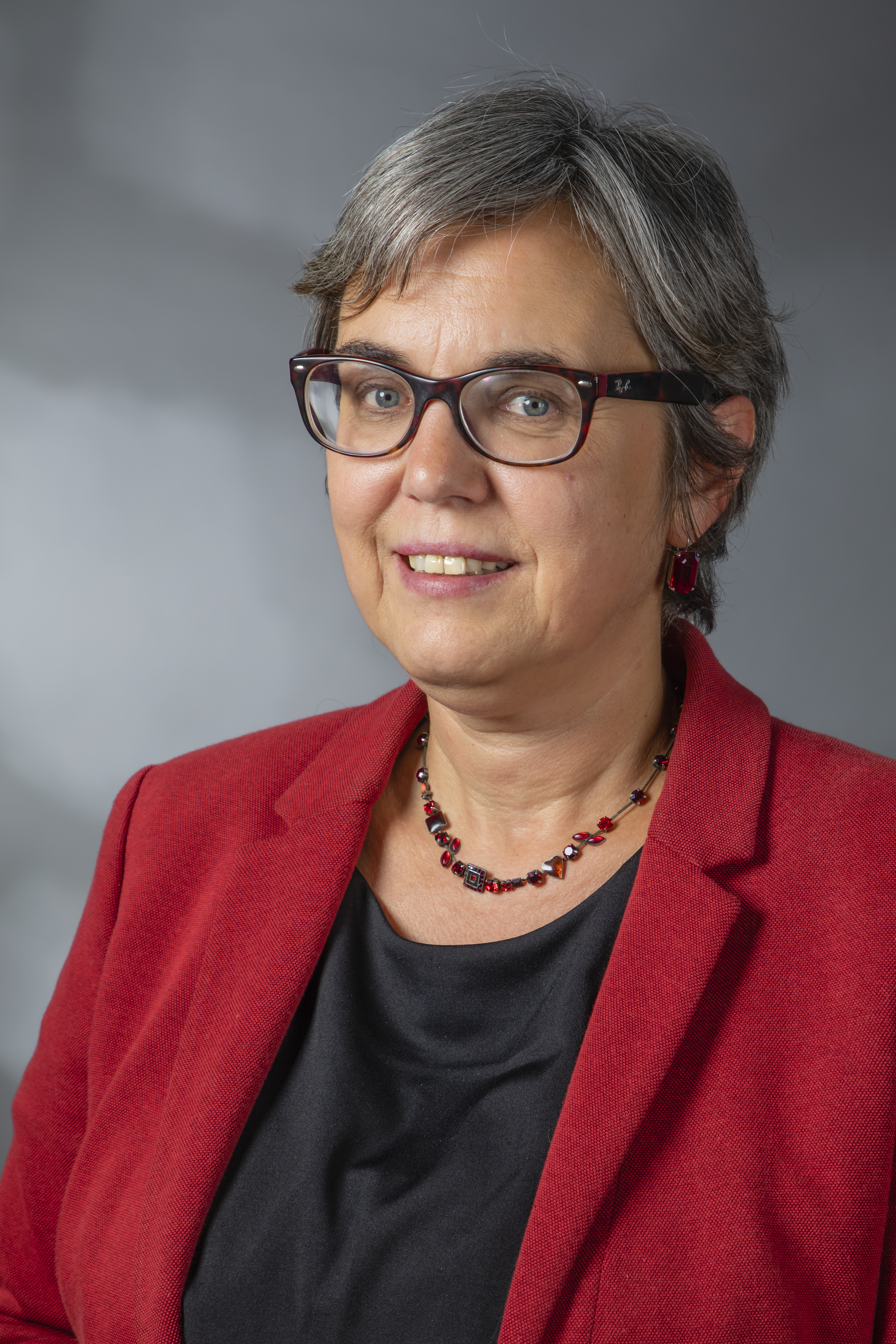 Anja Butschkau Wikipedia-Landtagsprojekt NRW 2019 22 March 2019 in DüsseldorfThis file was taken during the project “Landtag Nordrhein-Westfalen 2019” (German). Organisation: Olaf KosinskyPhotography: Foto-AG Gymnasium Melle: Karsten Mosebach, Anna Borchert, Lara Diekmann, Marieke Eckjans, Neele Grieger, Charlotte Meyran, Carolin Möller, Leoni Potts, Alicia Wulbusch Usage information If you need more information how to use this file, please send an email to . The making of this document was supported by Skillshare. Personality rights warningAlthough this work is freely licensed or in the public domain, the person(s) shown may have rights that legally restrict certain re-uses unless those depicted consent to such uses. In these cases, a model release or other evidence of consent could protect you from infringement claims.